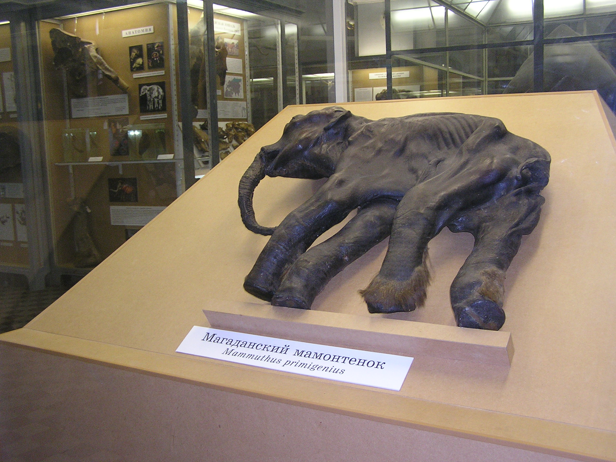 Зоологический музей в Санкт-Петербурге. Магаданский мамонтенок